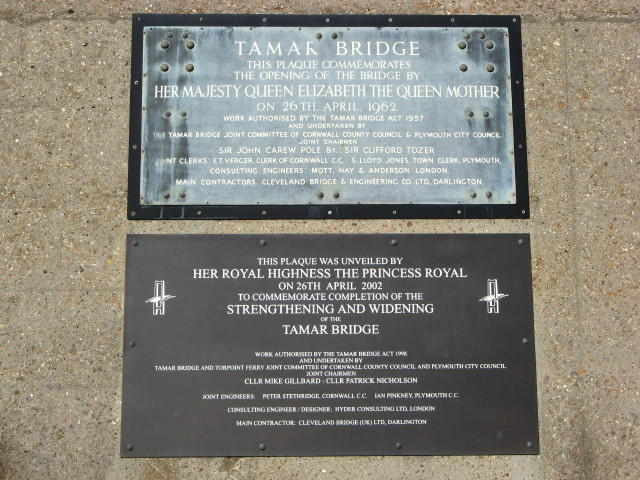 Tamar Bridge plaques